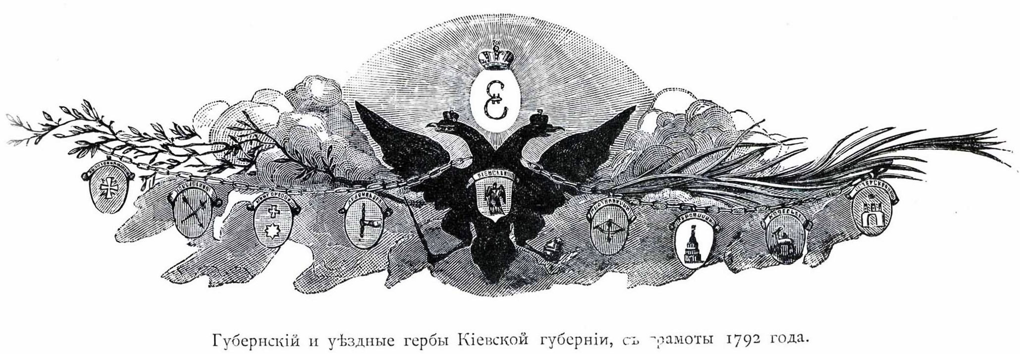 Kiev Gubernia herb 1792. Гербы уездов (малые) и Киевской губернии (большой) на грамоте 1792 года.